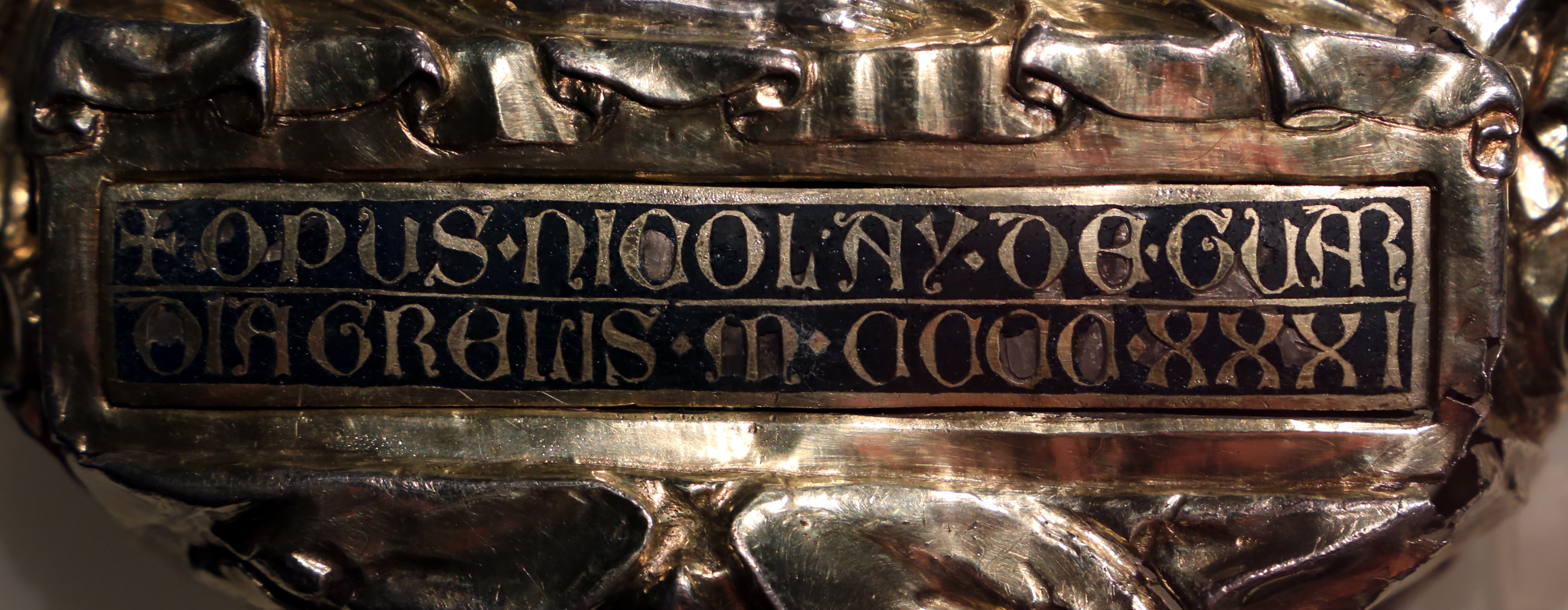 Piazza Santa Maria Maggiore This is a photo of a monument which is part of cultural heritage of Italy.